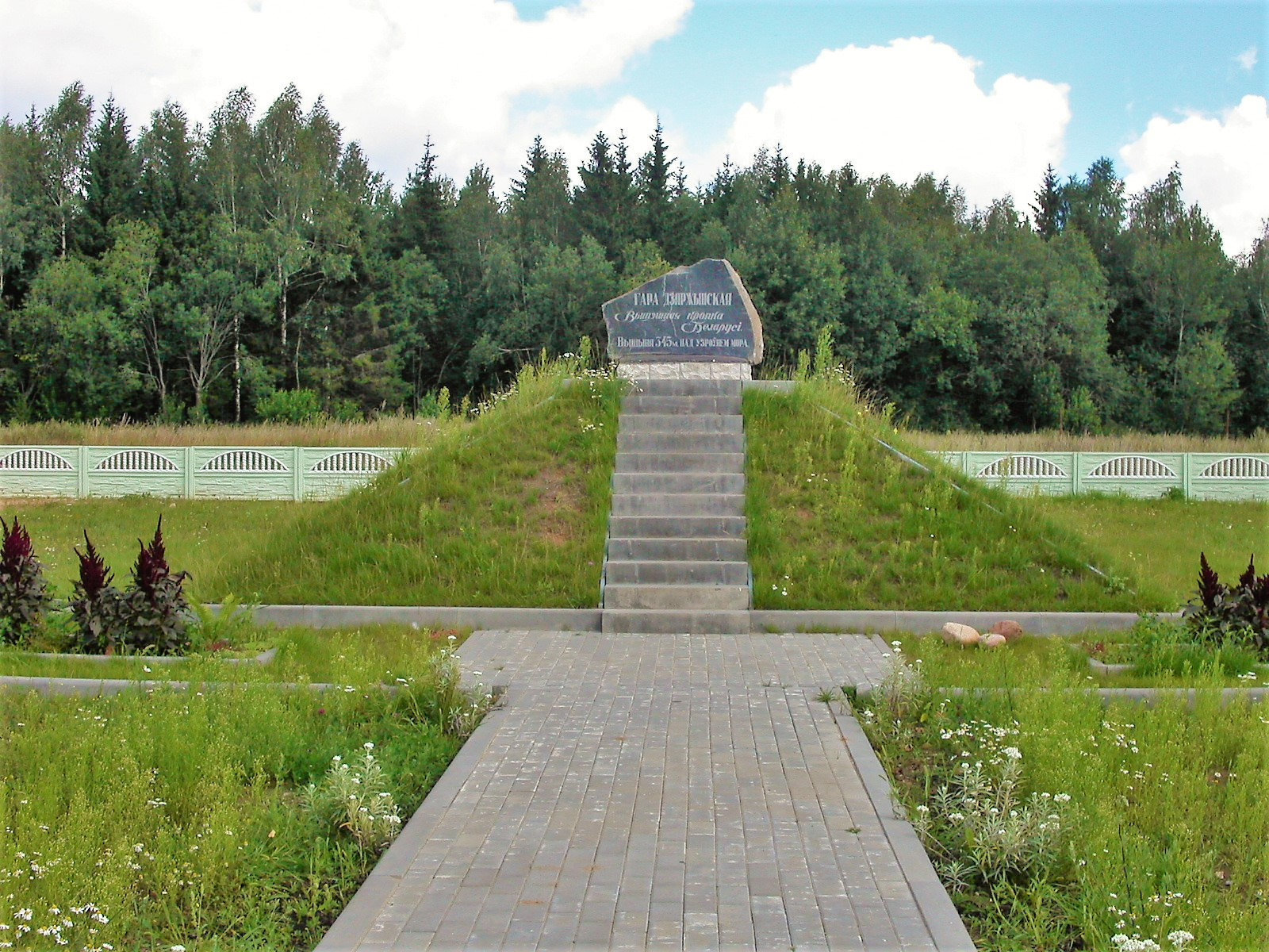 Дзяржынская гара каля вёскі Скірмантава — найвышшы пункт Беларусі (да 1958 Святая гара)